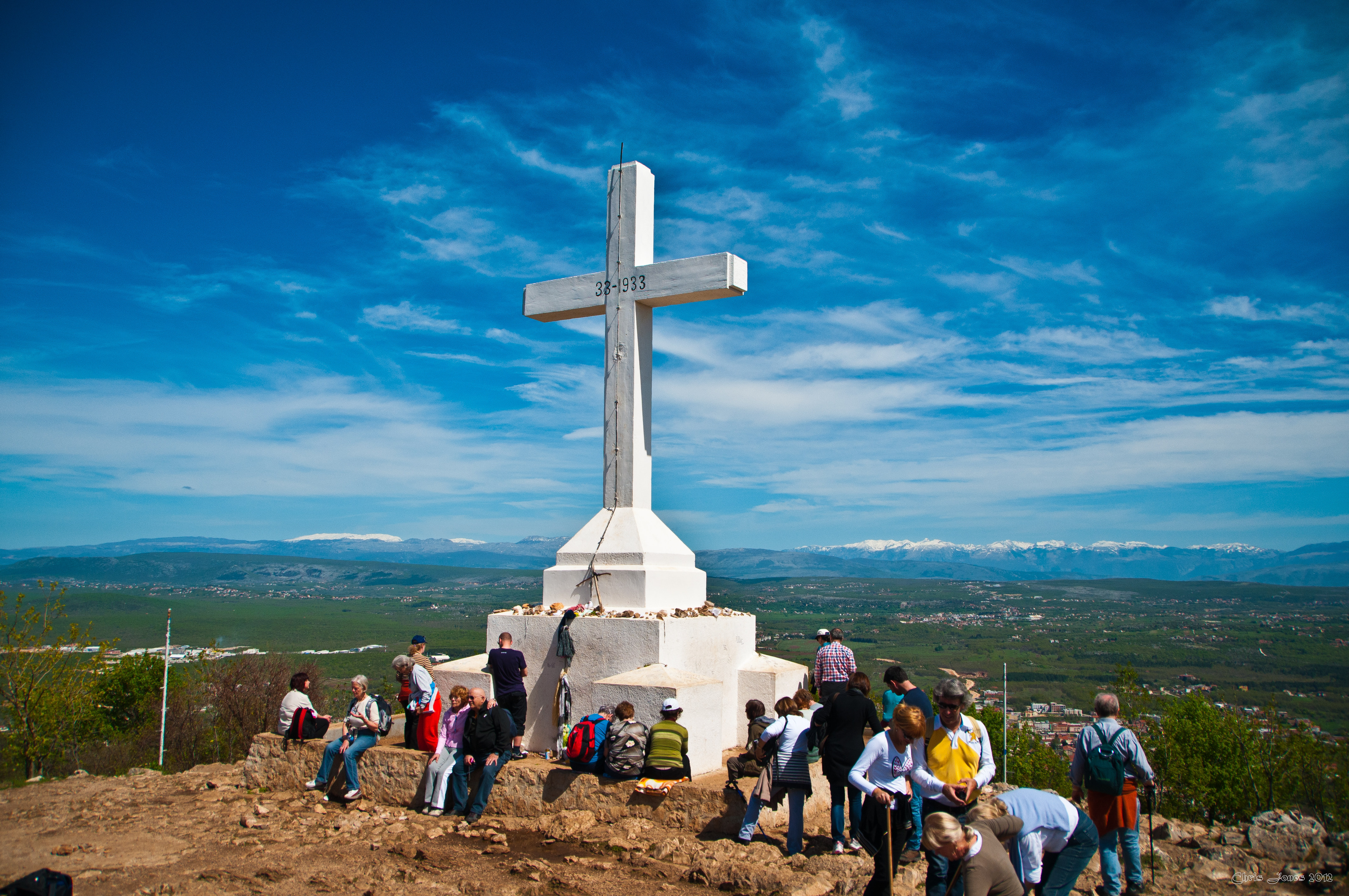 Međugorje